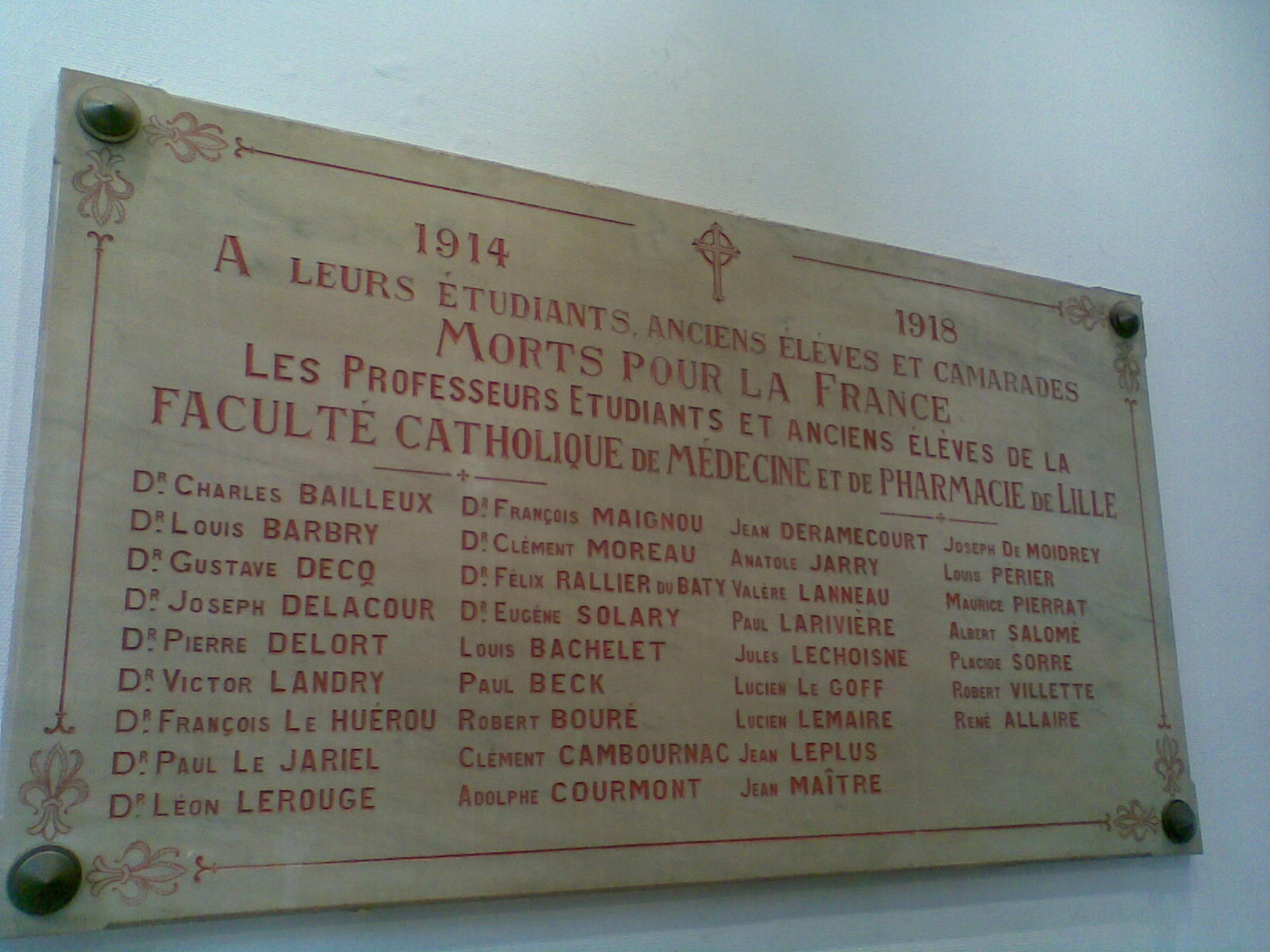 Description plaque commémorative dans le hall de flm de Lille Date2008SourceSelf-photographedAuthorcourivaud plaque commémorative dans le hall de flm de Lille